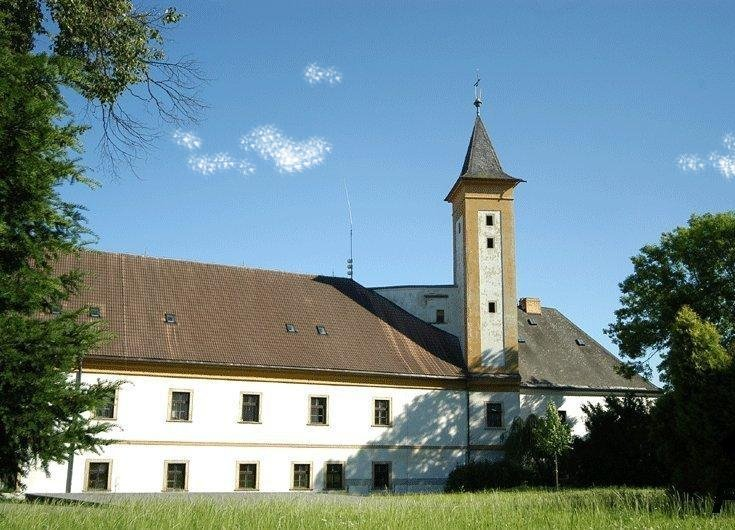 Zámek Zábřeh - pohled od severovýchodu